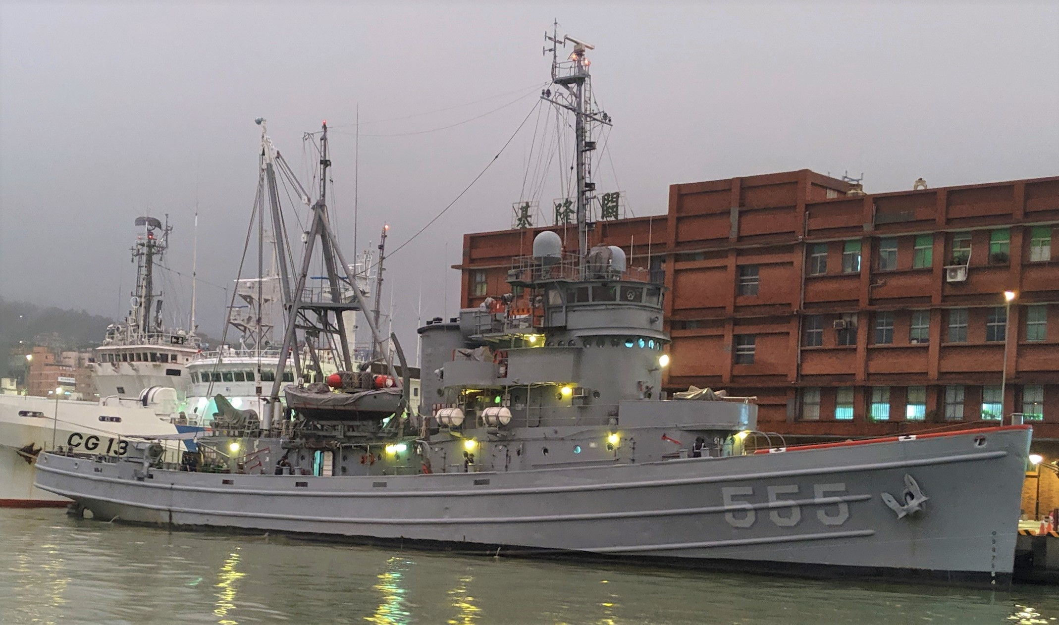 中華民國海軍威海營區開放參觀，基隆港西岸碼頭，大峰軍艦（ATF-555）右側與基隆海關大樓。本艦不開放參觀。